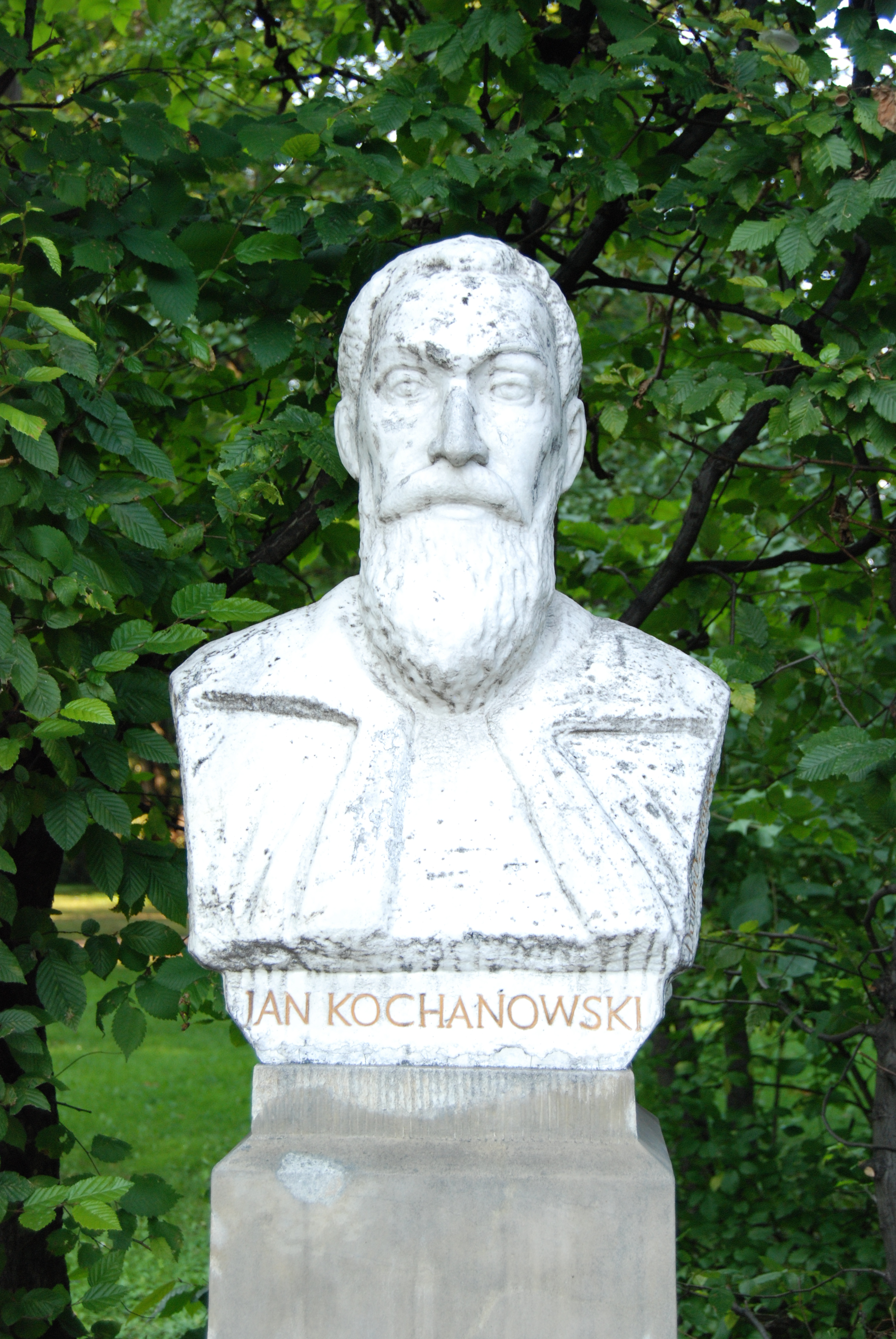 Pomnik Jana Kochanowskiego w Parku Jordana w Krakowie